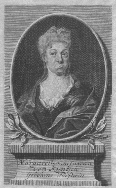 Margaretha Susanna von Kuntsch (1651-1717), copper engraving, 147x88mm